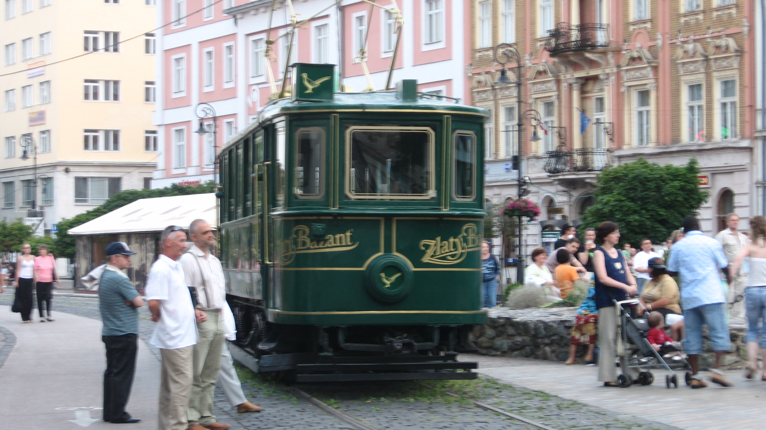 Historická električka vo farbách pivovaru Zlatý Bažant slúžiaca ako reštaurácia na Hlavnej triede v Košiciach